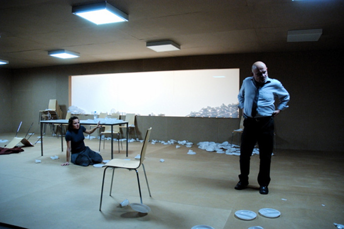 Blackbird, Regie: Grazyna Kania, Inszenierung am Teatr Dramatyczny in Warszawa